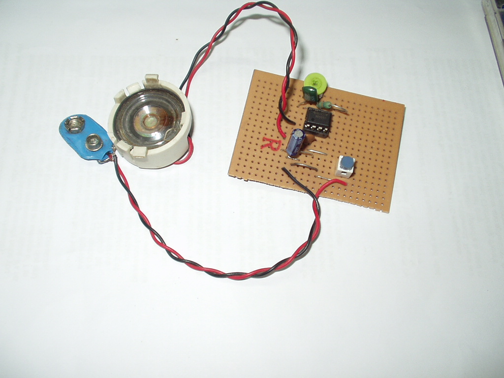 electronic circuit. --Mamun2a 07:37, 1 October 2006 (UTC)